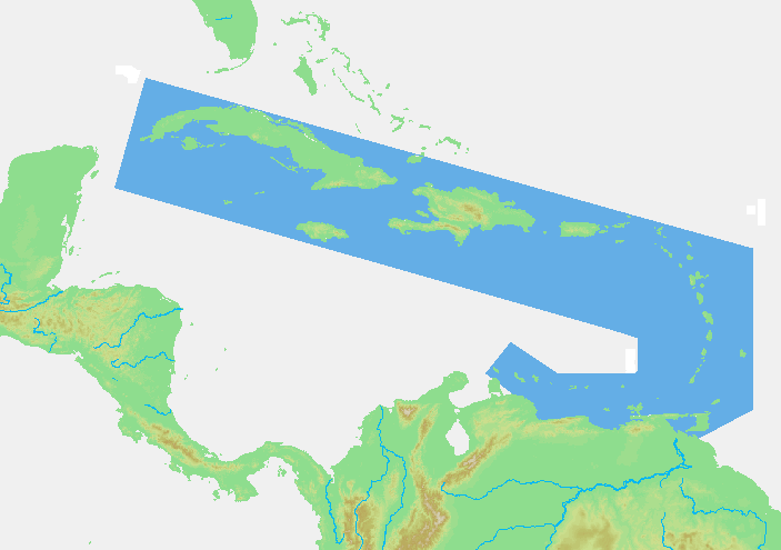 Caribbean - Lesser Antilles.PNG